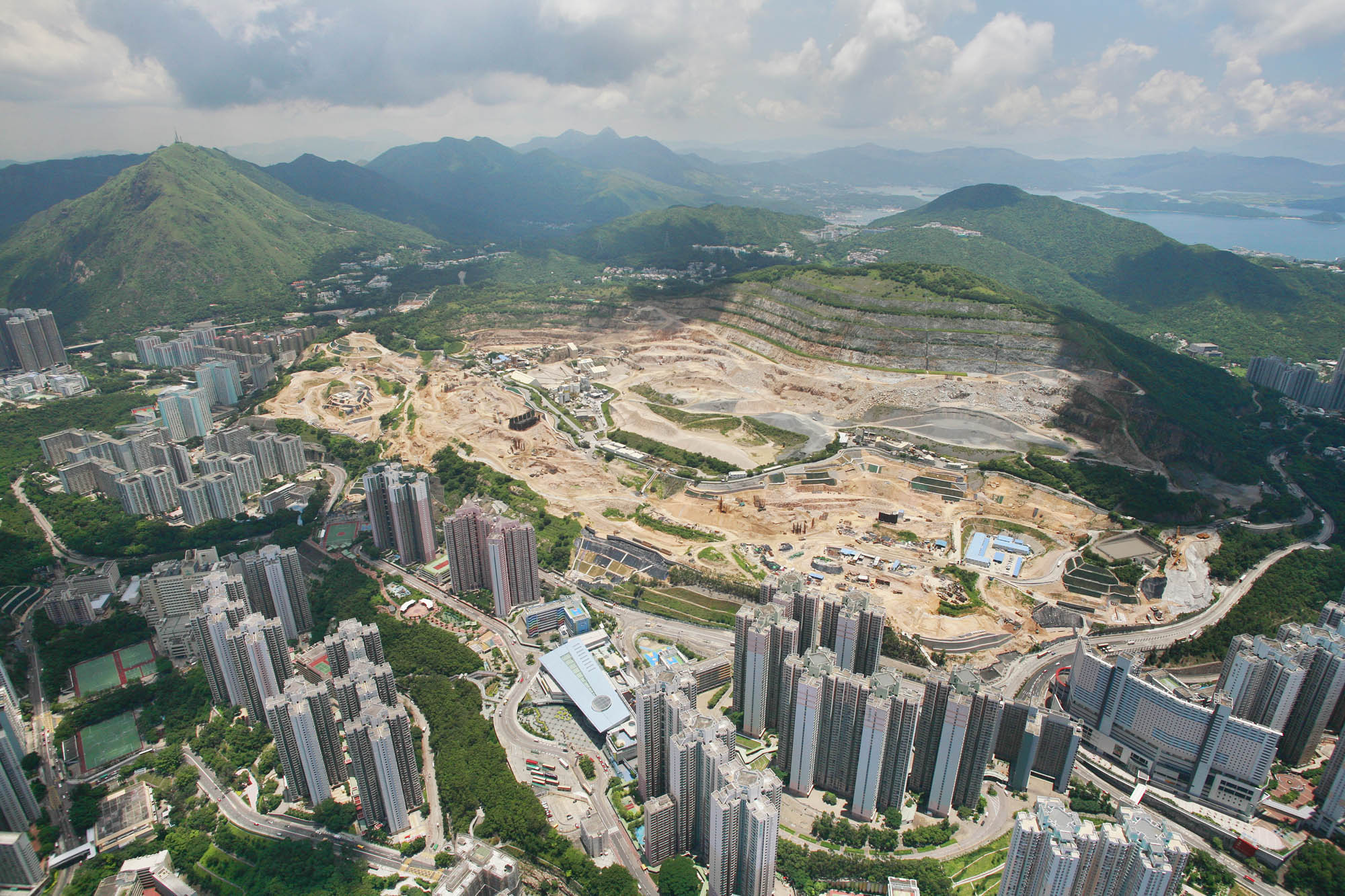 九龍東,安達臣